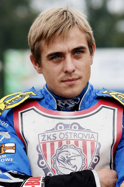 Krystian Klecha w barwach ŻKS Ostrova Ostrów w sezone 2010